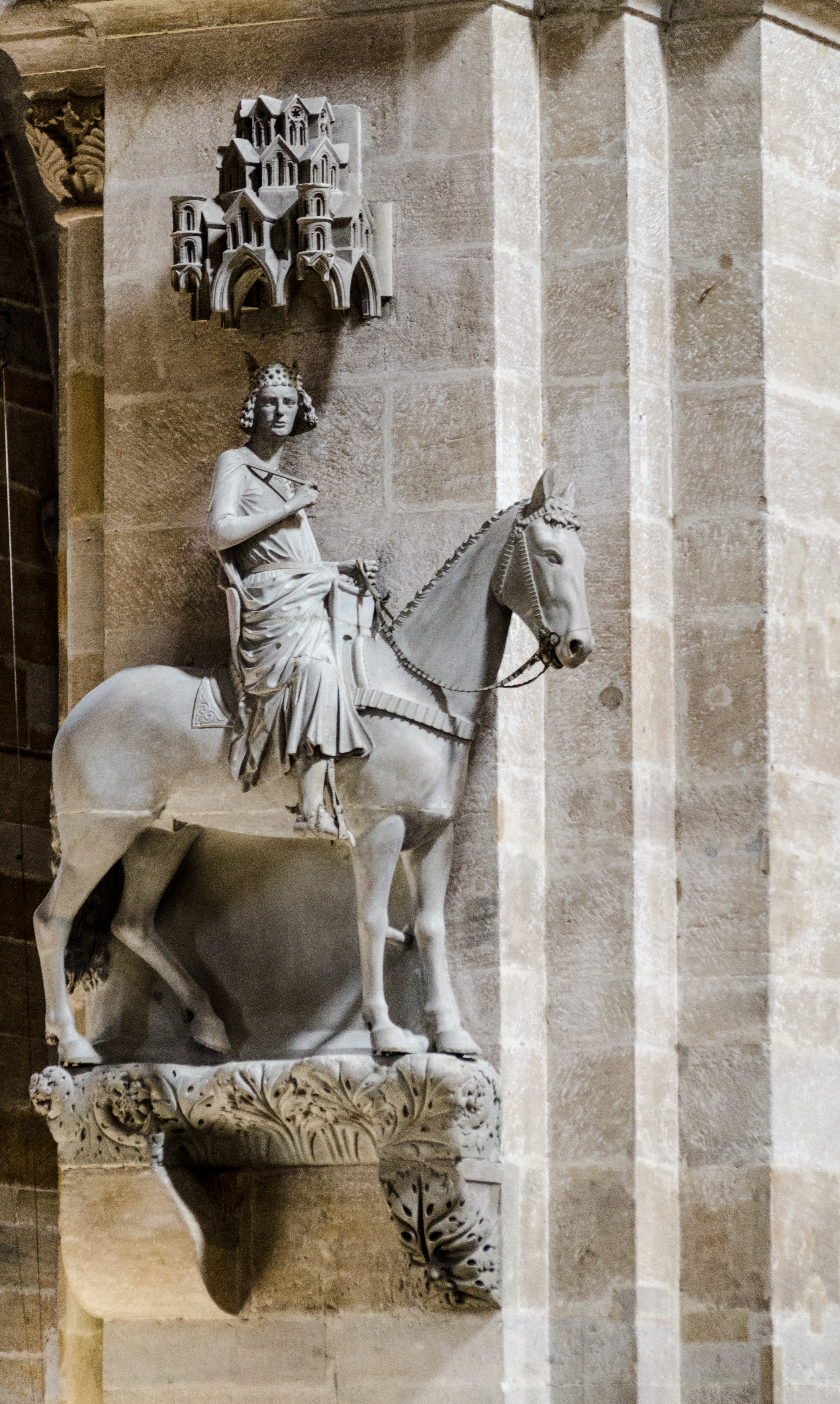 Bamberger Dom